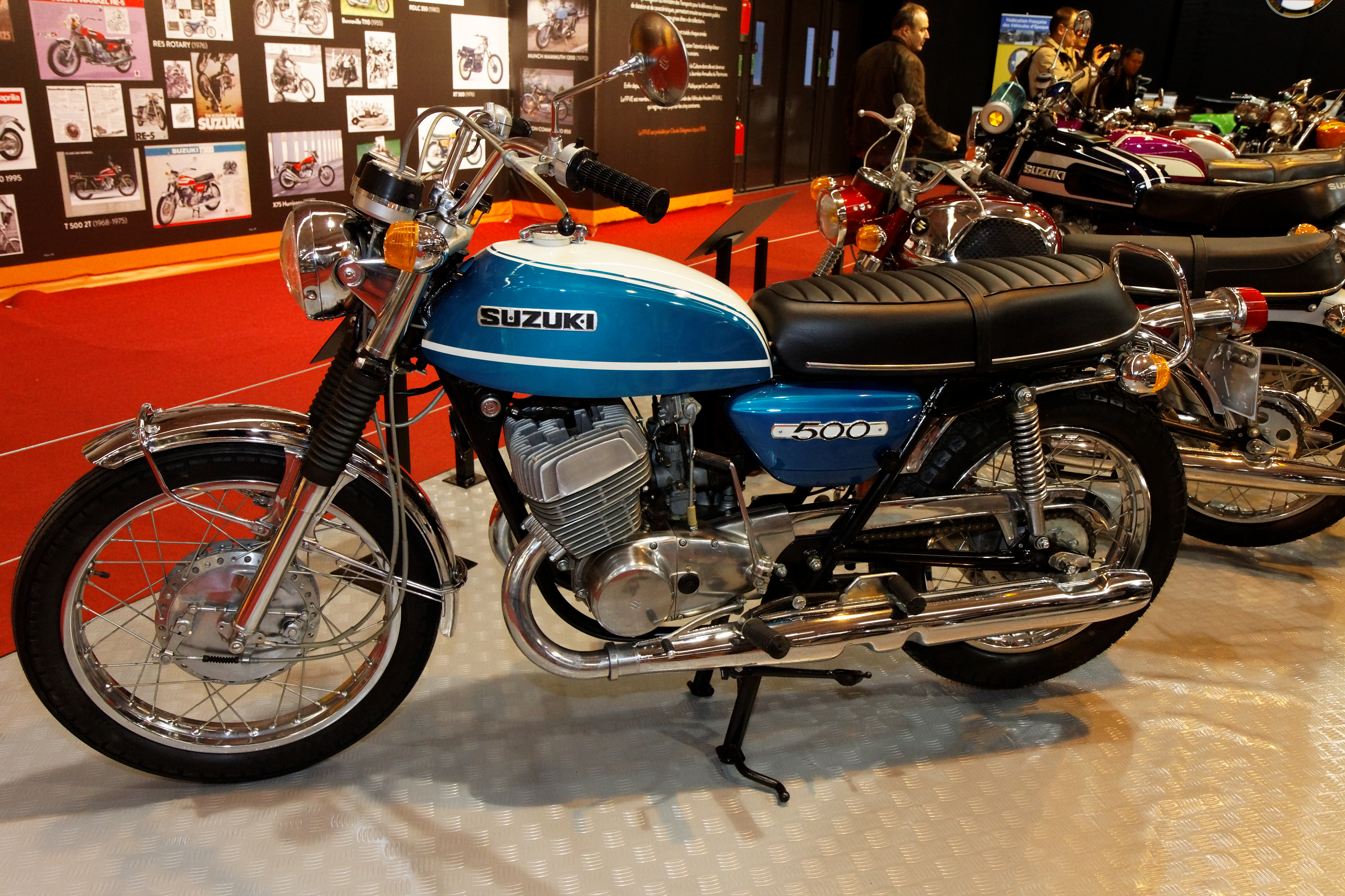 Suzuki - T 500